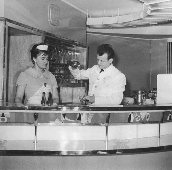 Zentralbild Burmeister 15.4.1961 Telefoto Wismar: FDGB-Urlauberschiff "Fritz Heckert" übergeben. Das 7400 Brt. große Urlauberschiff "Fritz Heckert" ist am Sonnabendvormittag (15.4.61) in der Mathias-Thesen-Werft Wismar feierlich dem FDGB übergeben worden. Die Erbauer des schwimmenden Ferienpalastes begingen diesen Tag gemeinsam mit tausenden Werktätigen und einer Hamburger Werft- und Hafenarbeiter-Delegation. (Siehe auch ADN-Meldung 88a-209 und und weitere vom 15.4.61) UBz. Barkeeper Hans-Gerd Müller und Jutta Mierse warten auf die Gäste.